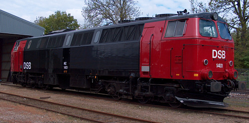 Billede taget af Mz 1401, den 27.maj.2006 ved åbent hus i Randers Remissen.